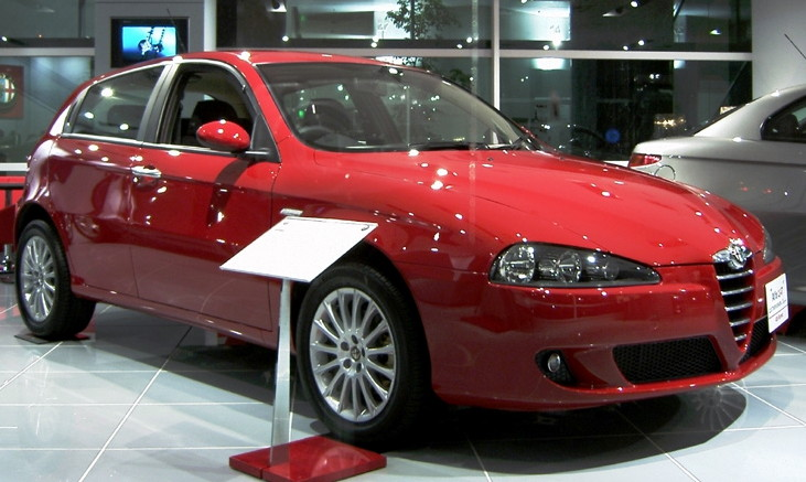 Alfa_Romeo_147 Alfa Romeo Shinjuku park